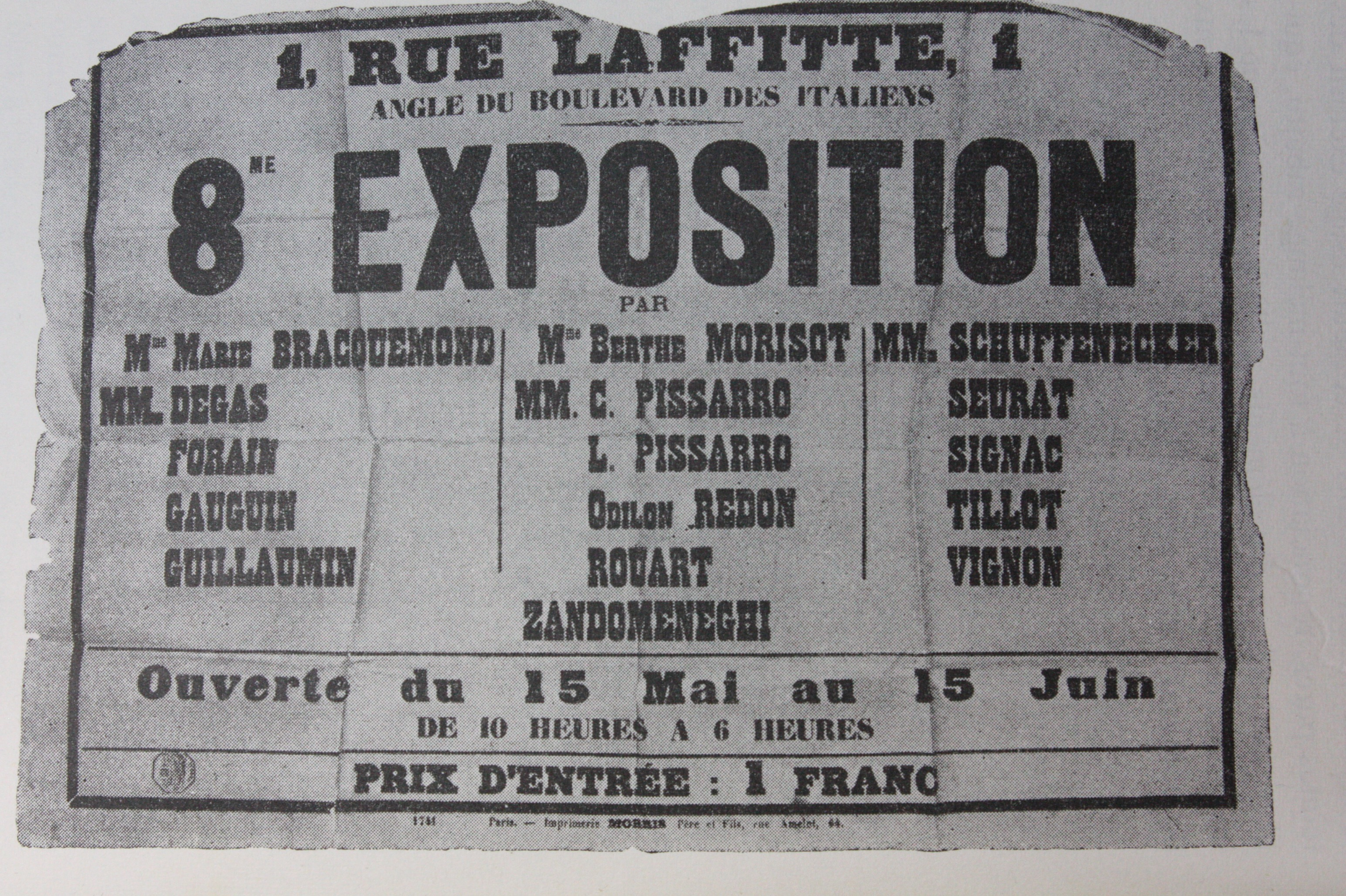 Photo de l'affiche